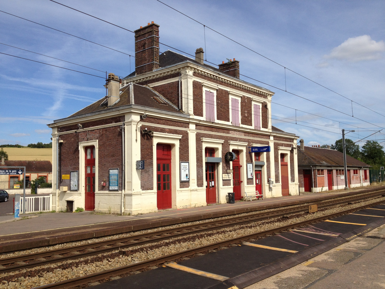 Bâtiment voyageurs de la gare de Bueil, département de l'Eure, Haute-Normandie, France.